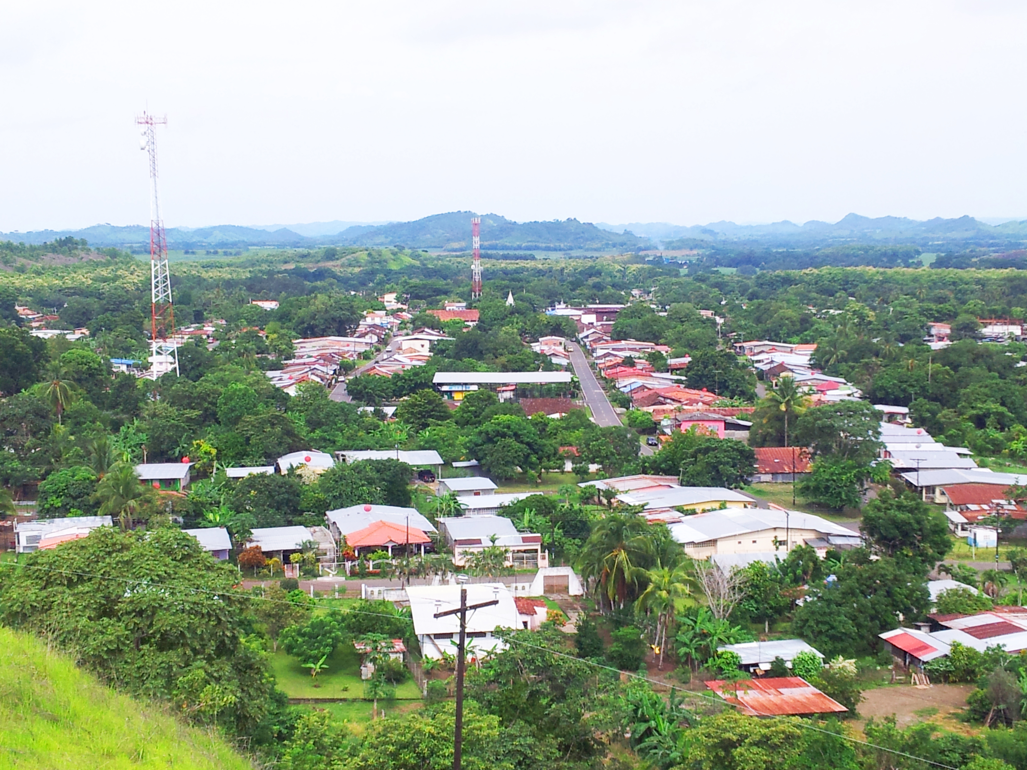 Vista de Pesé desde el Cerro la Cruz.